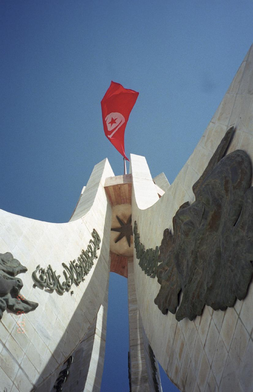 Monument de la place de la kasbah (Tunis)